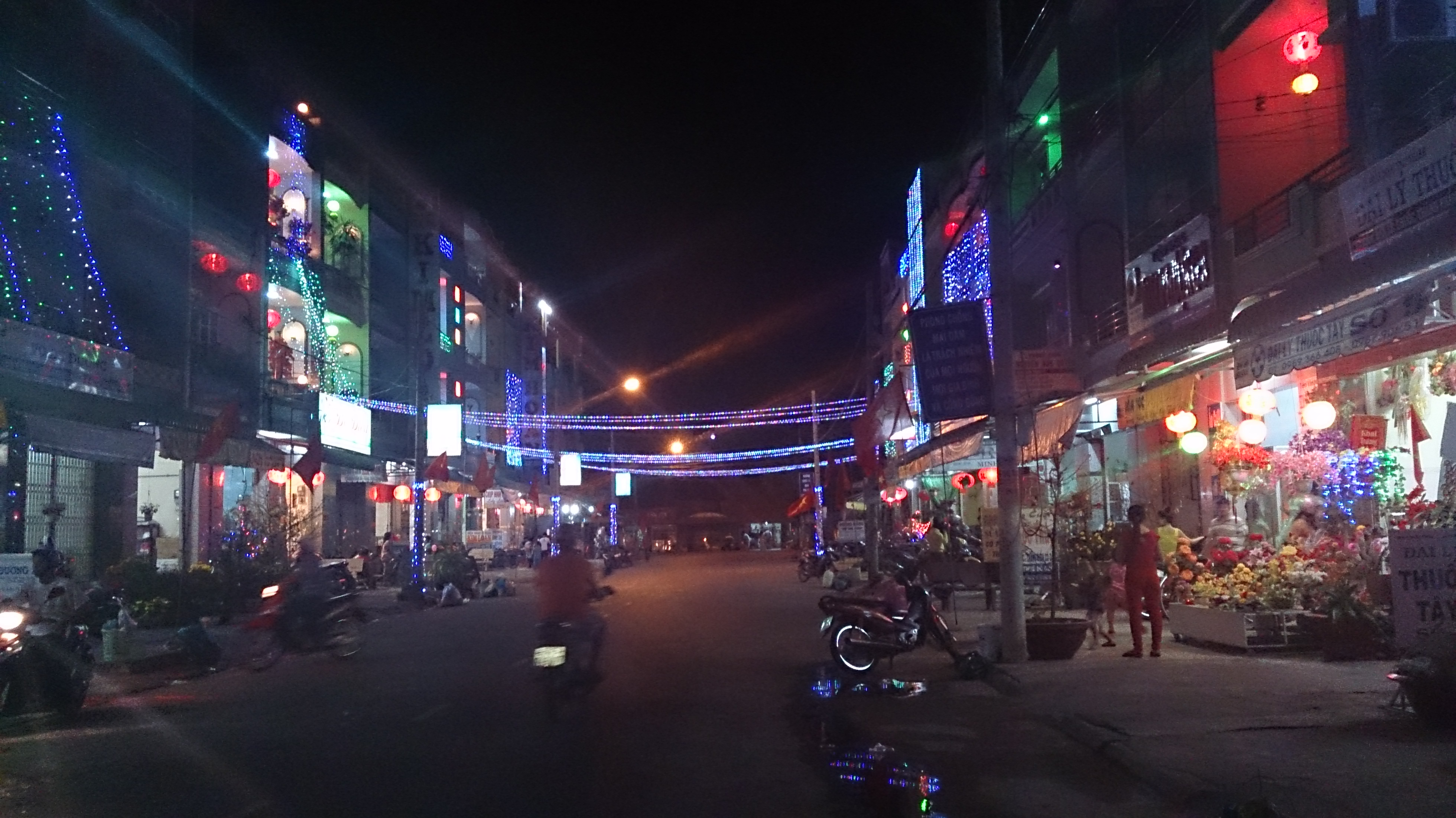 KP 2, thị trấn Thạnh Hoá